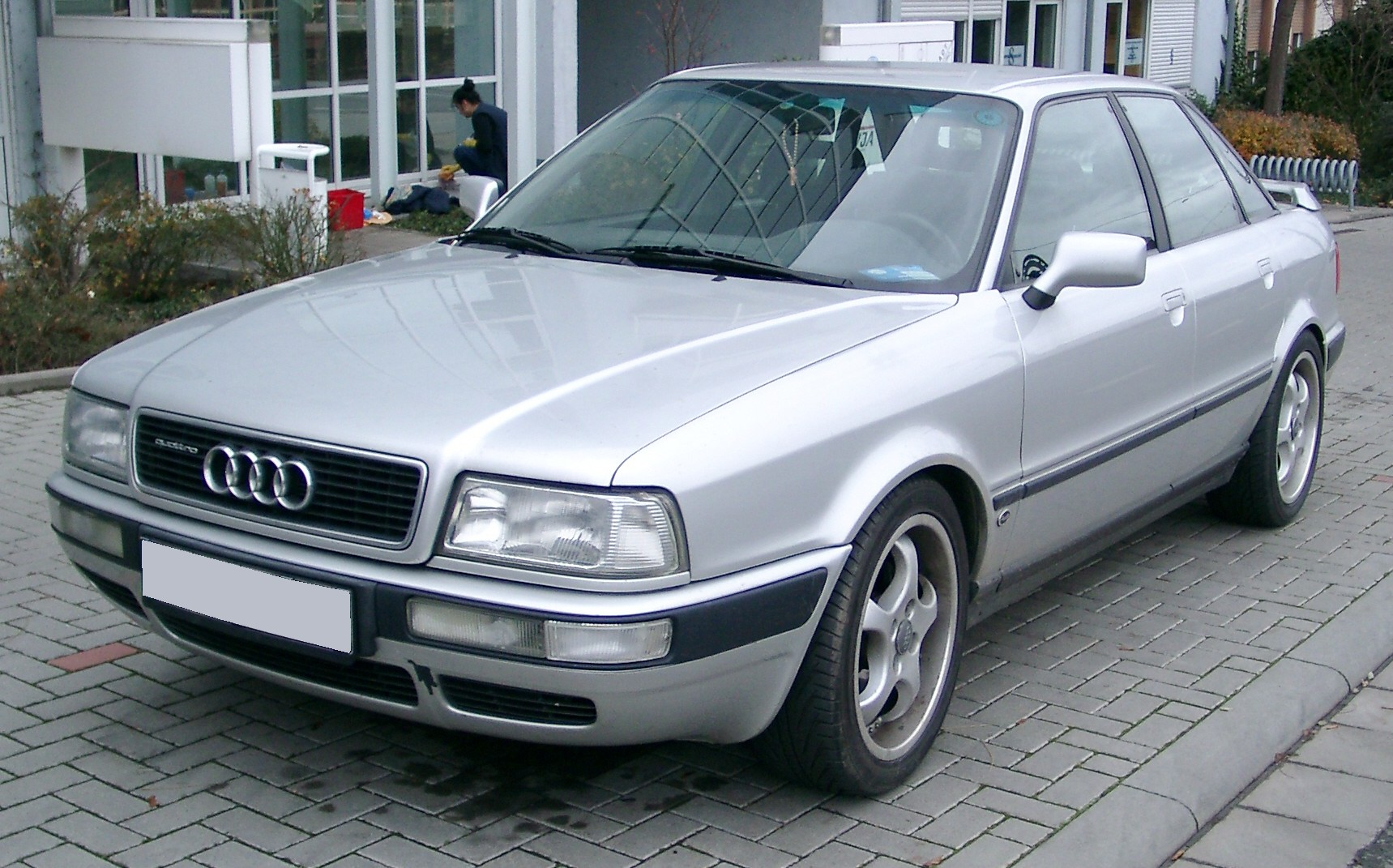 Audi 80 B4